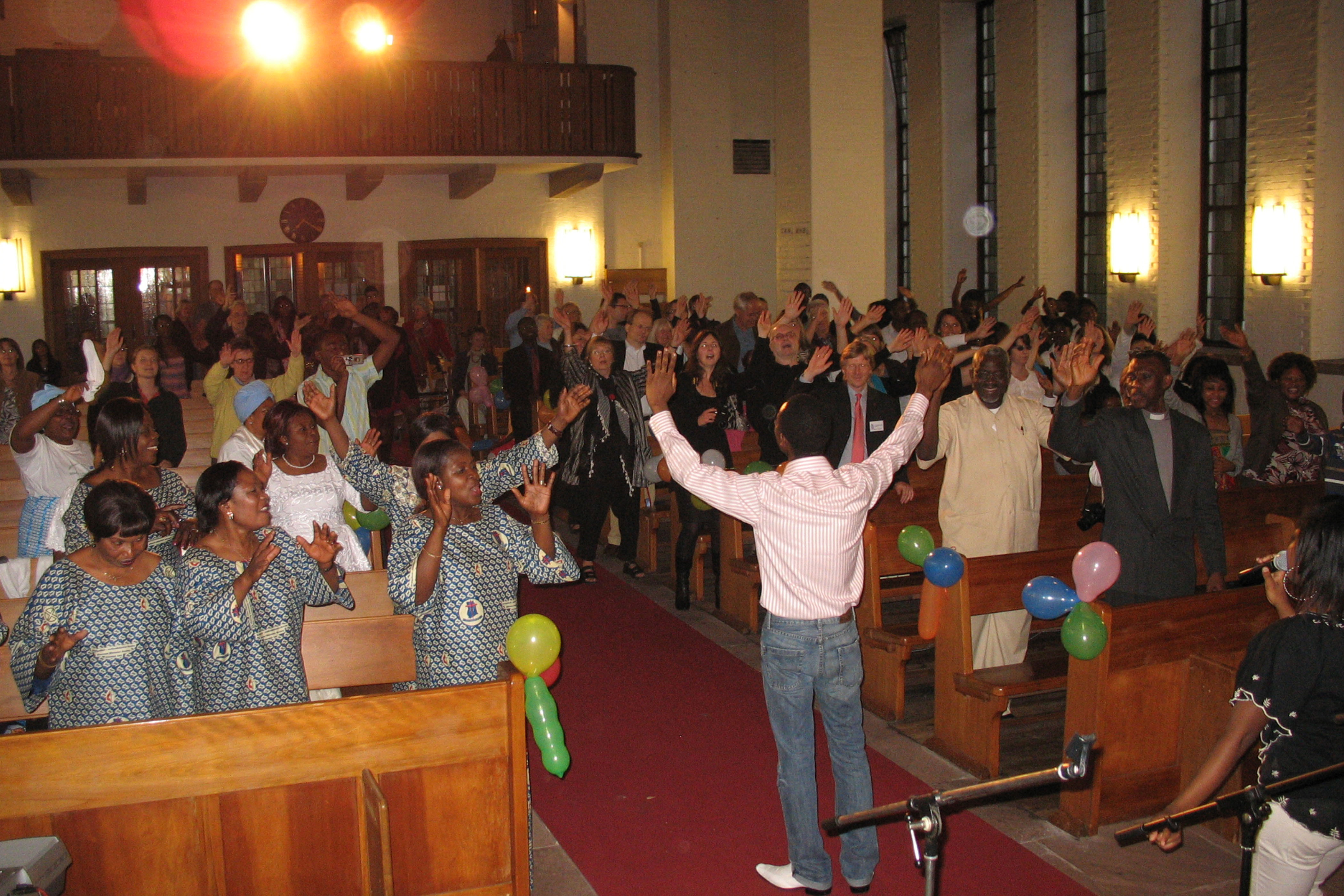 Szene aus der Nacht der Kirchen im Afrikanischen Zentrum Borgfelde (Erlöserkirche (Hamburg-Borgfelde)) This is a photograph of an architectural monument.